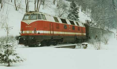 DR-Baureihe 118 (Unterbaureihe 118.2-4) bei Stützerbach 1994